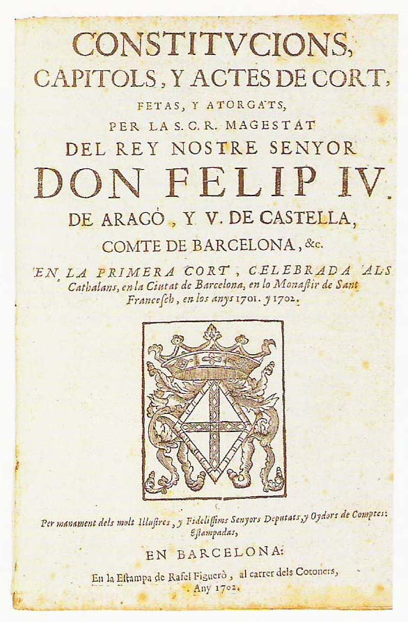 Constitucions, capítols i actes de Cort de les Corts de Barcelona de 1701-1702 presidides per Felip V d'Espanya.